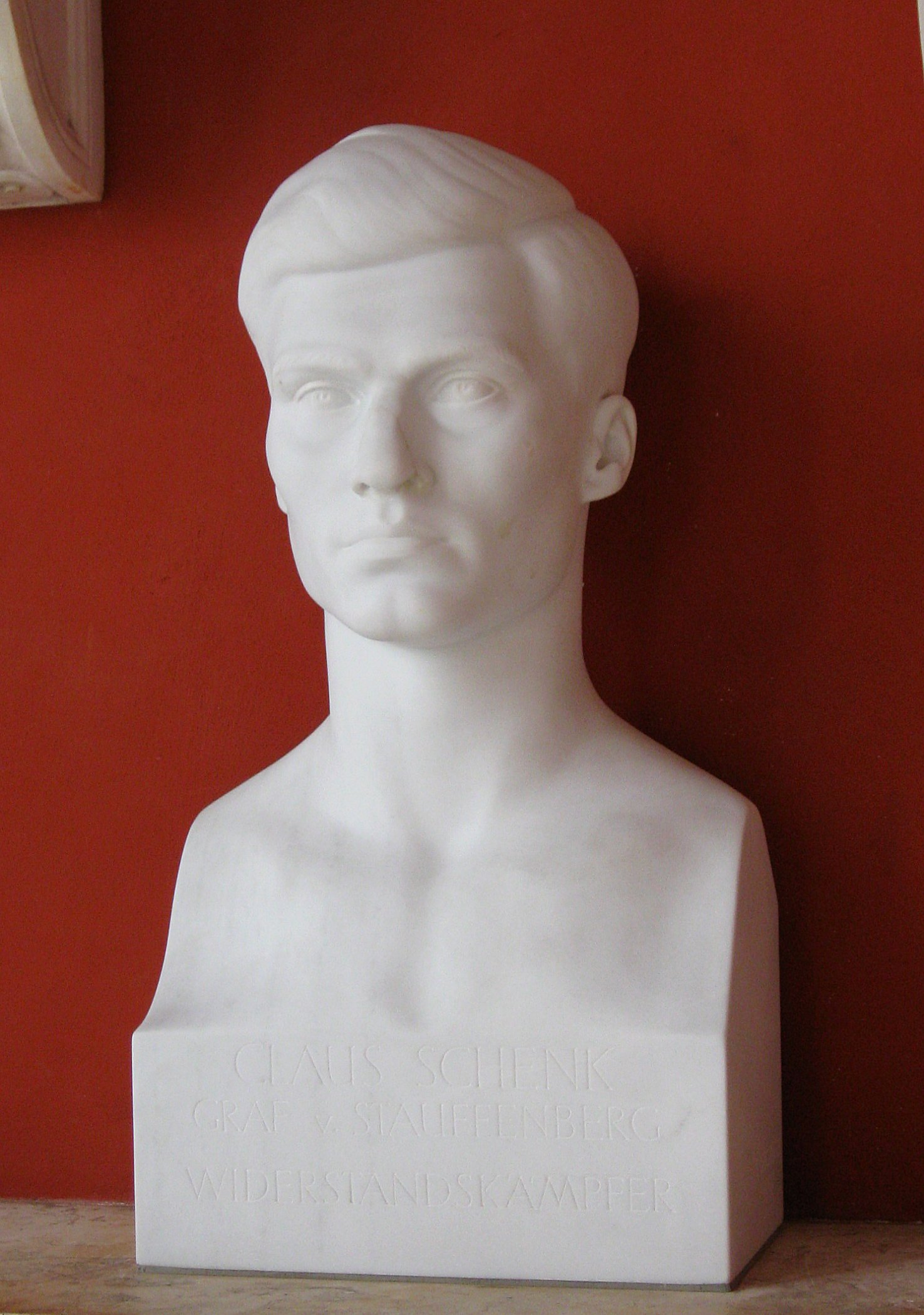 Theresienhöhe 16; Ruhmeshalle, dreiflügelige, dorische Ruhmeshalle mit Büsten verdienter Bayern, 1843–53 von Leo von Klenze. Stauffenberg